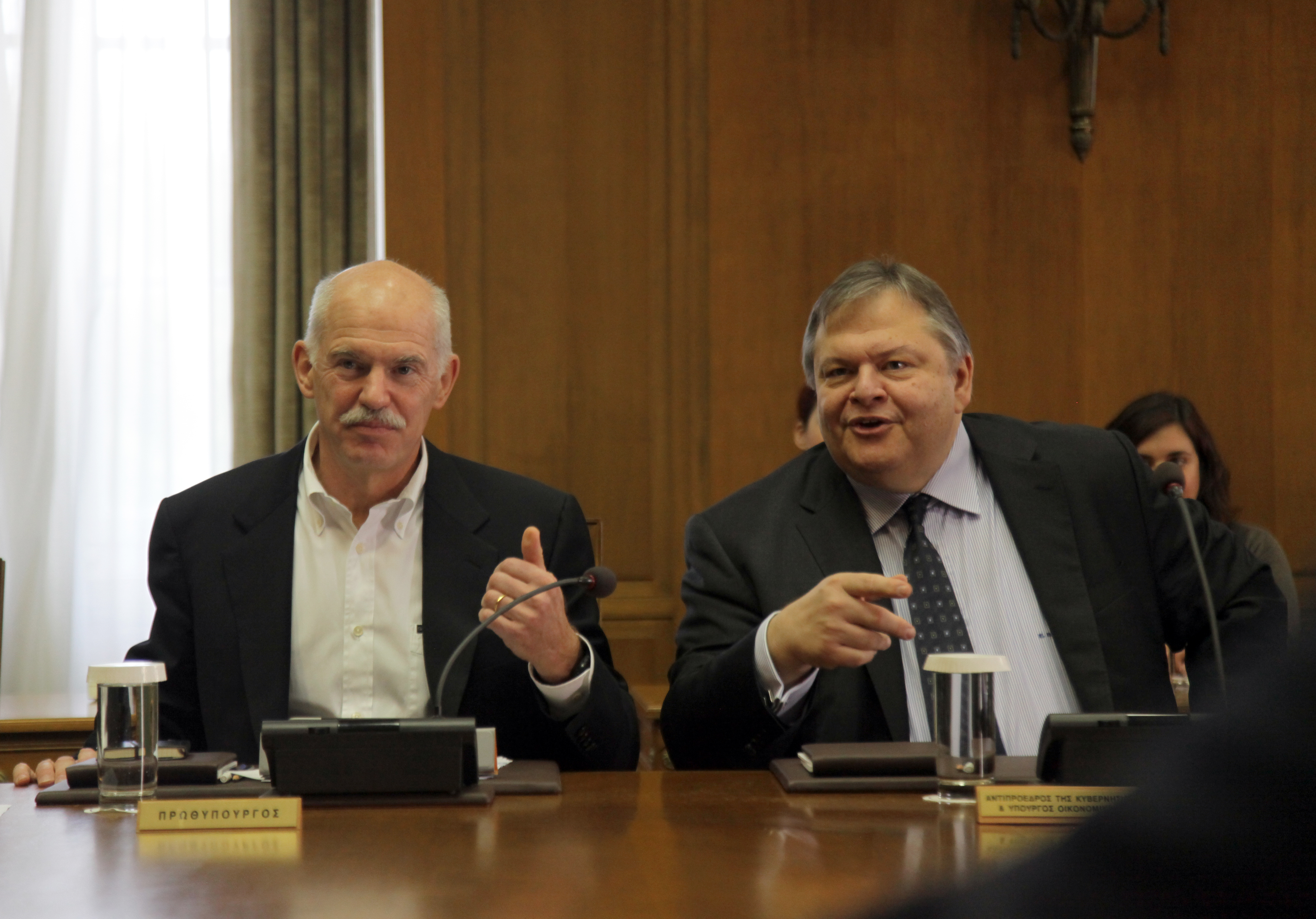 Συνεδρίαση του Υπουργικού Συμβουλίου Αίθουσα Υπουργικού Συμβουλίου, Κοινοβούλιο 8 Νοεμβρίου, 2011